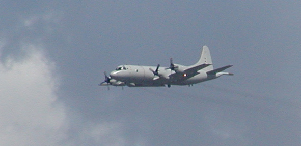 Der Ubootjäger „Orion“ über der Elbemündung